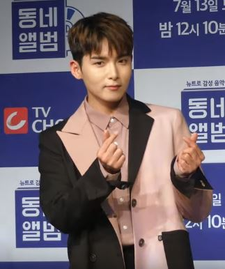 9일 오후 서울시 영등포구 여의도 서울마리나에서 TV조선 '동네앨범' 제작발표회가 열려 슈퍼주니어 려욱이 참석해 포토타임을 갖고 있다.